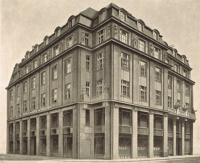 G. Gaudig & Blum, Leipzig, Geschäftshaus Brühl 36-40.